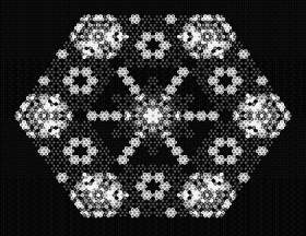 automat komórkowy na siatce sześciokątnej